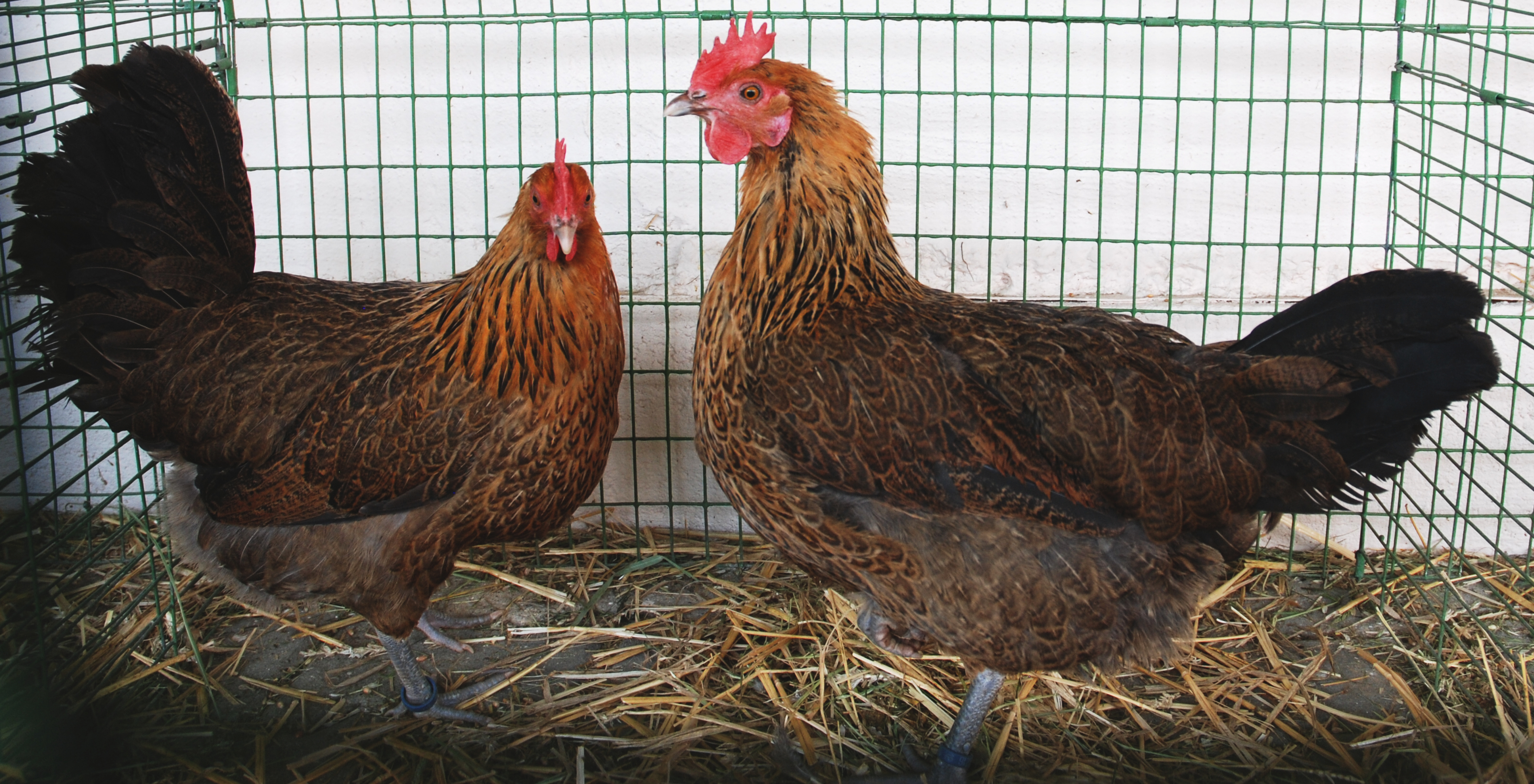 české slepice zlatě kropenaté